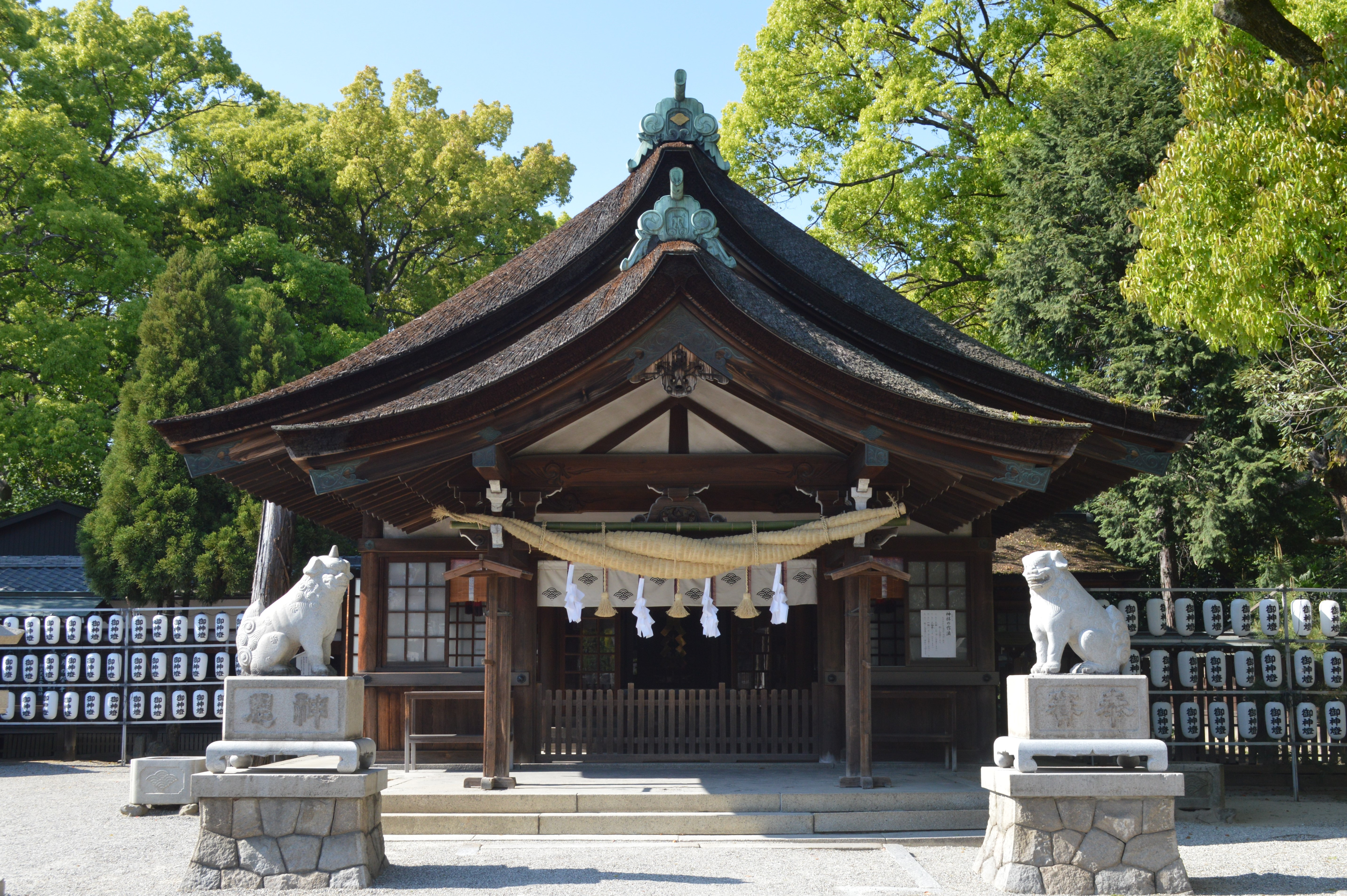 愛知県知立市にある知立神社。拝殿。登録有形文化財。